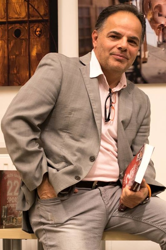 Harle Tamás fotója